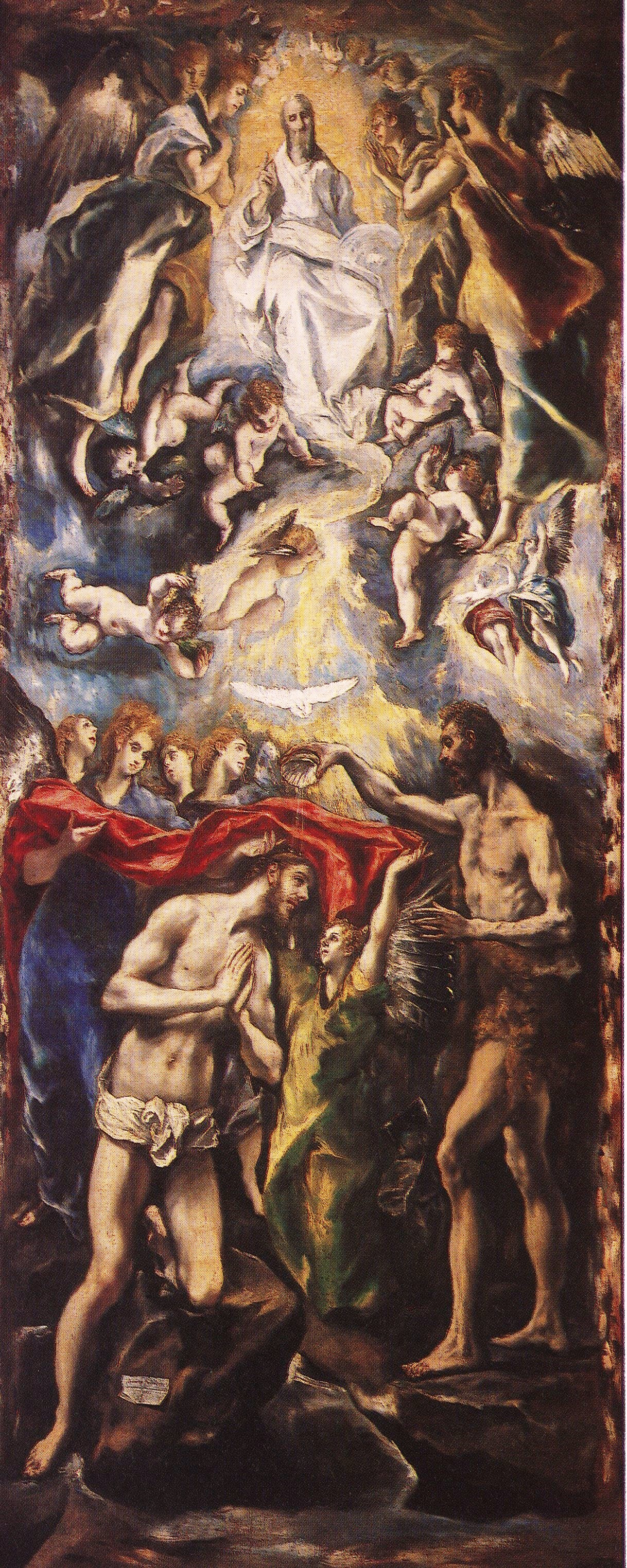 La obra representa el momento en que Jesucristo fue bautizado por el profeta San Juan Bautista.